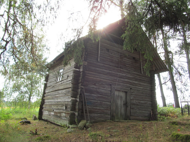 Карытніца. Капіца на могілках